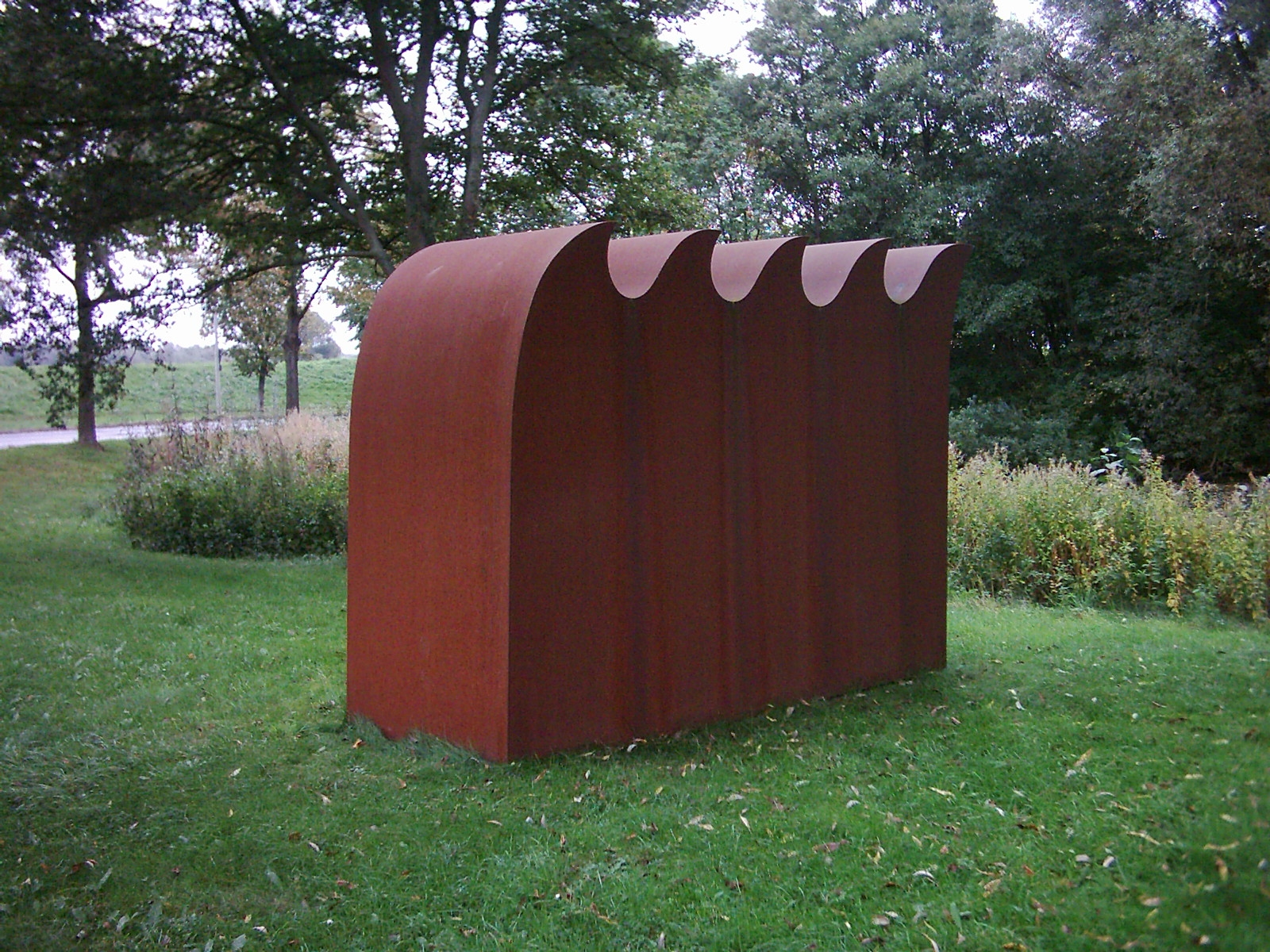 Flutdenkmal der Sturmflut vom 16. Februar 1962. Denkmal Hohenwischer Brack in Francop, Hamburg